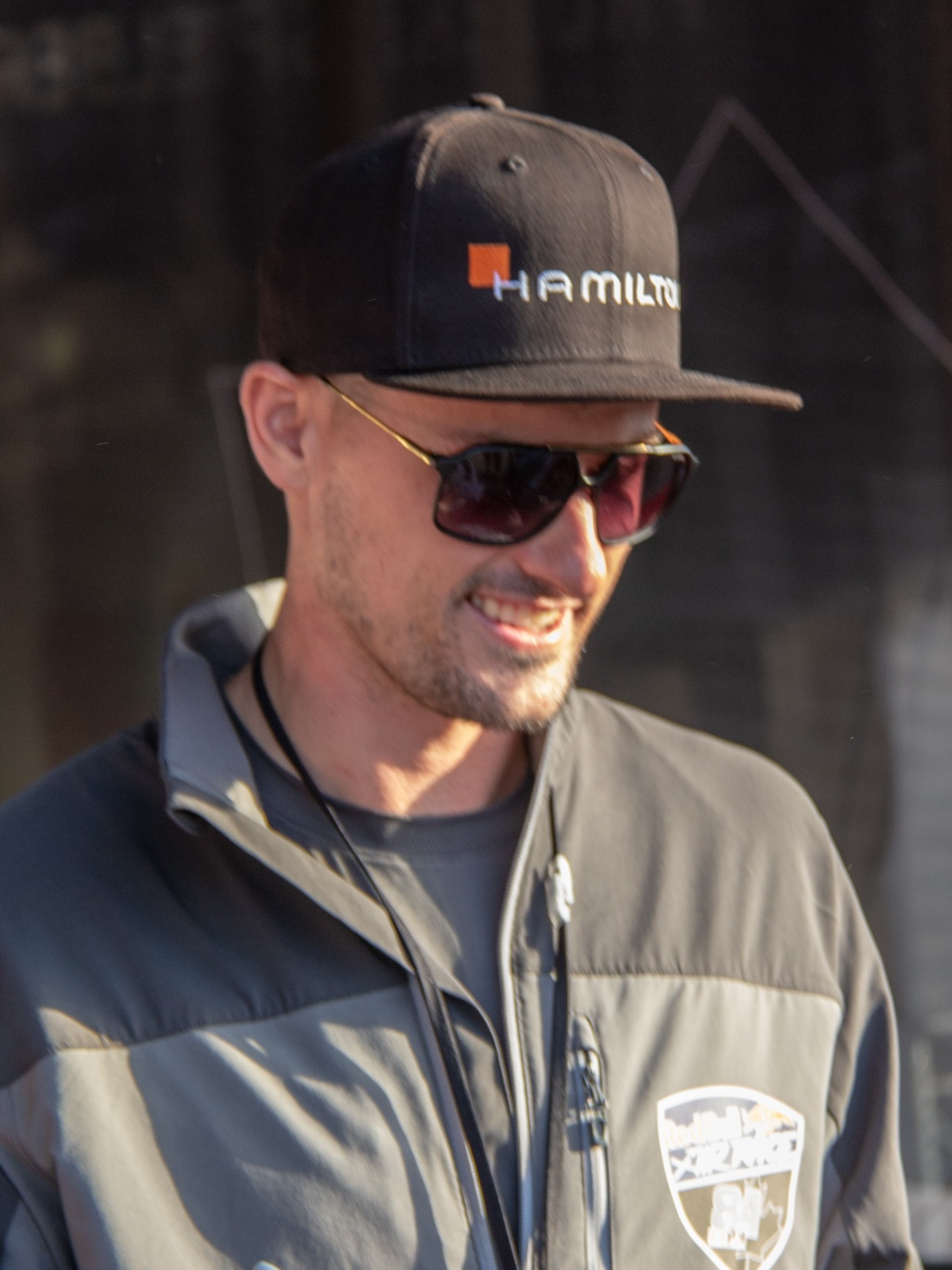 2018年レッドブル・エアレース・ワールドシリーズ 千葉 ピート・マクロード